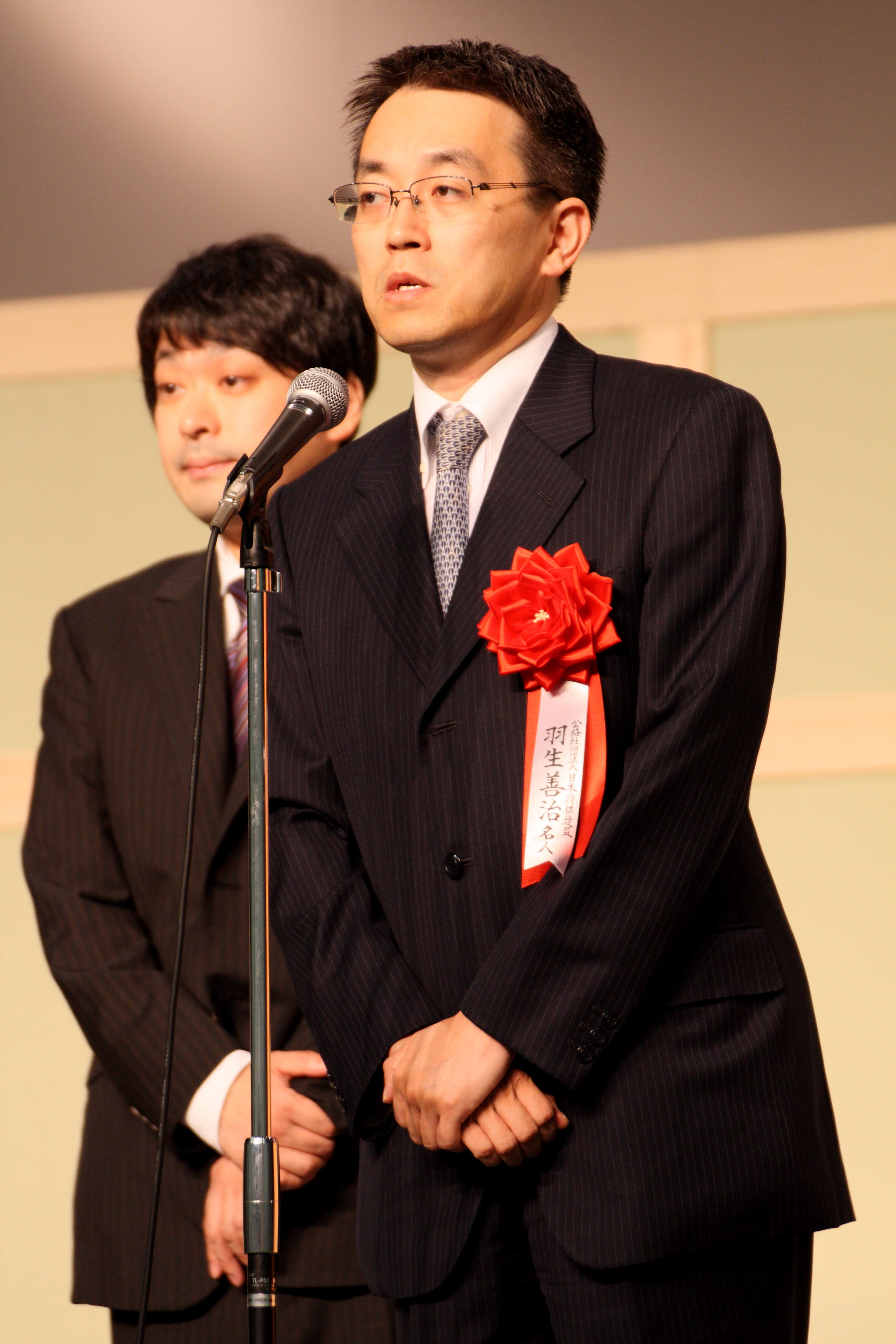 将棋日本シリーズ